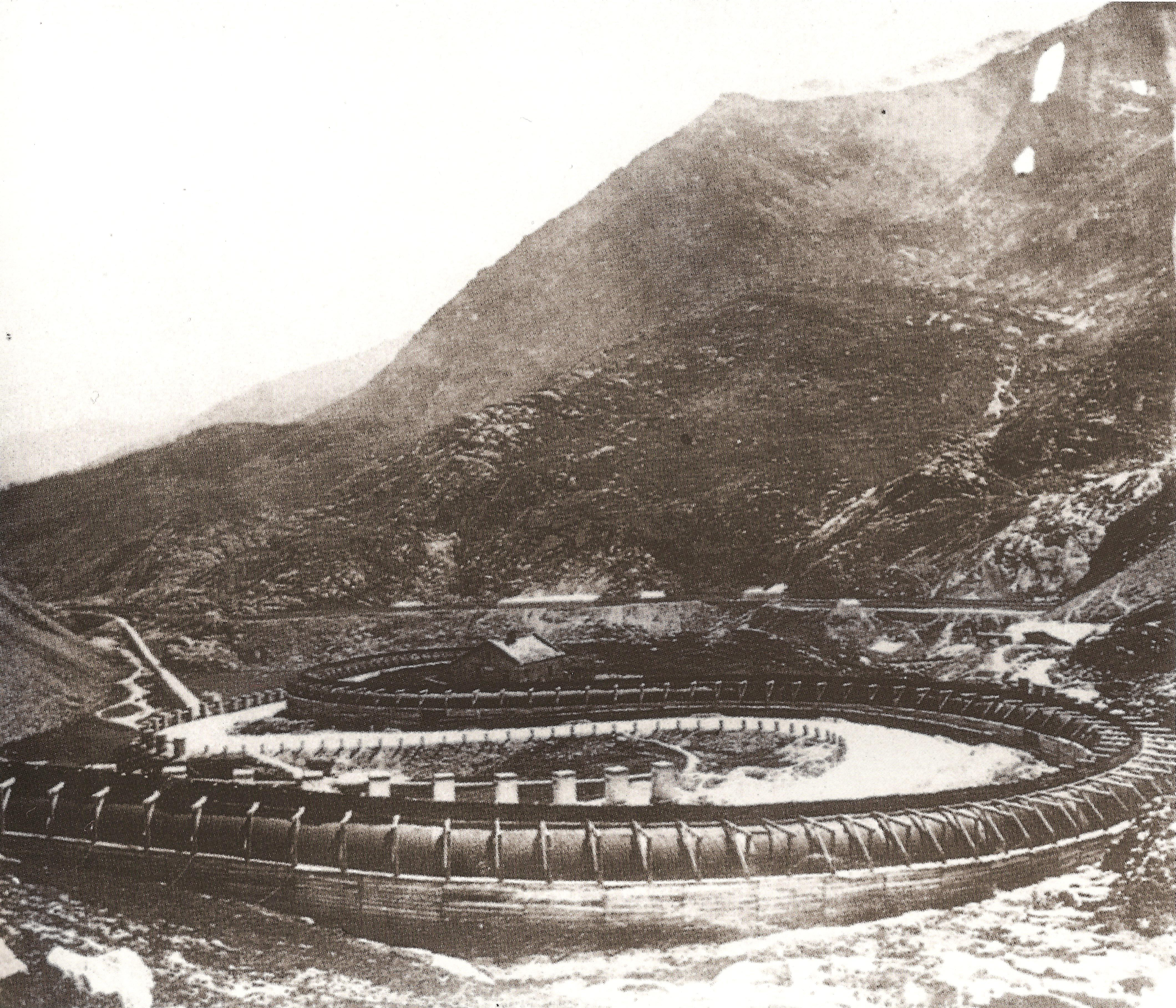 Vista sulla ferrovia Fell coperta con lamiera ondulata